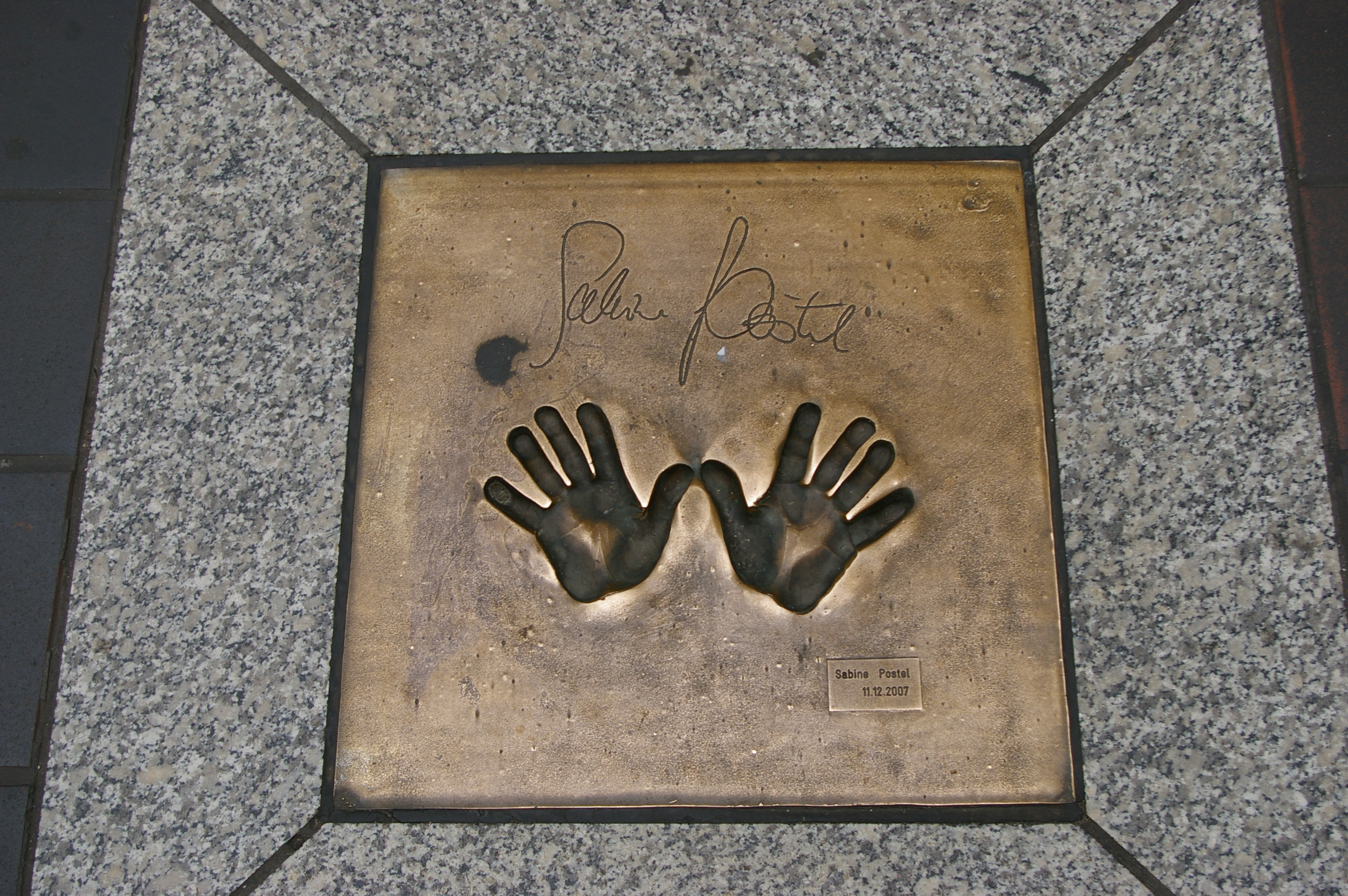 Bremen, Handabdruck in der Lloyd- Passage